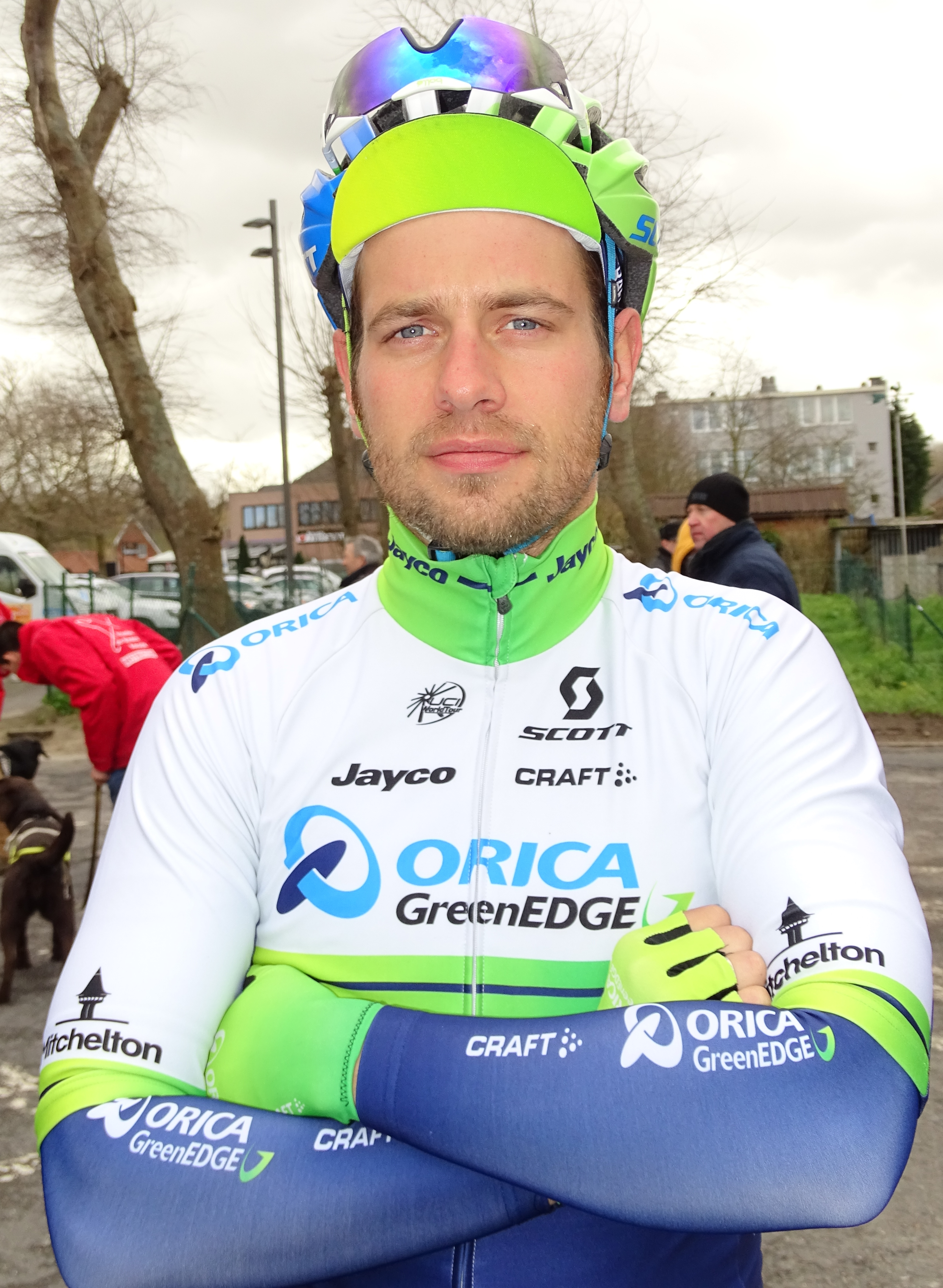 Reportage réalisé le mardi 31 mars à l'occasion de du départ de la première étape des Trois jours de La Panne 2015 à La Panne, Belgique.